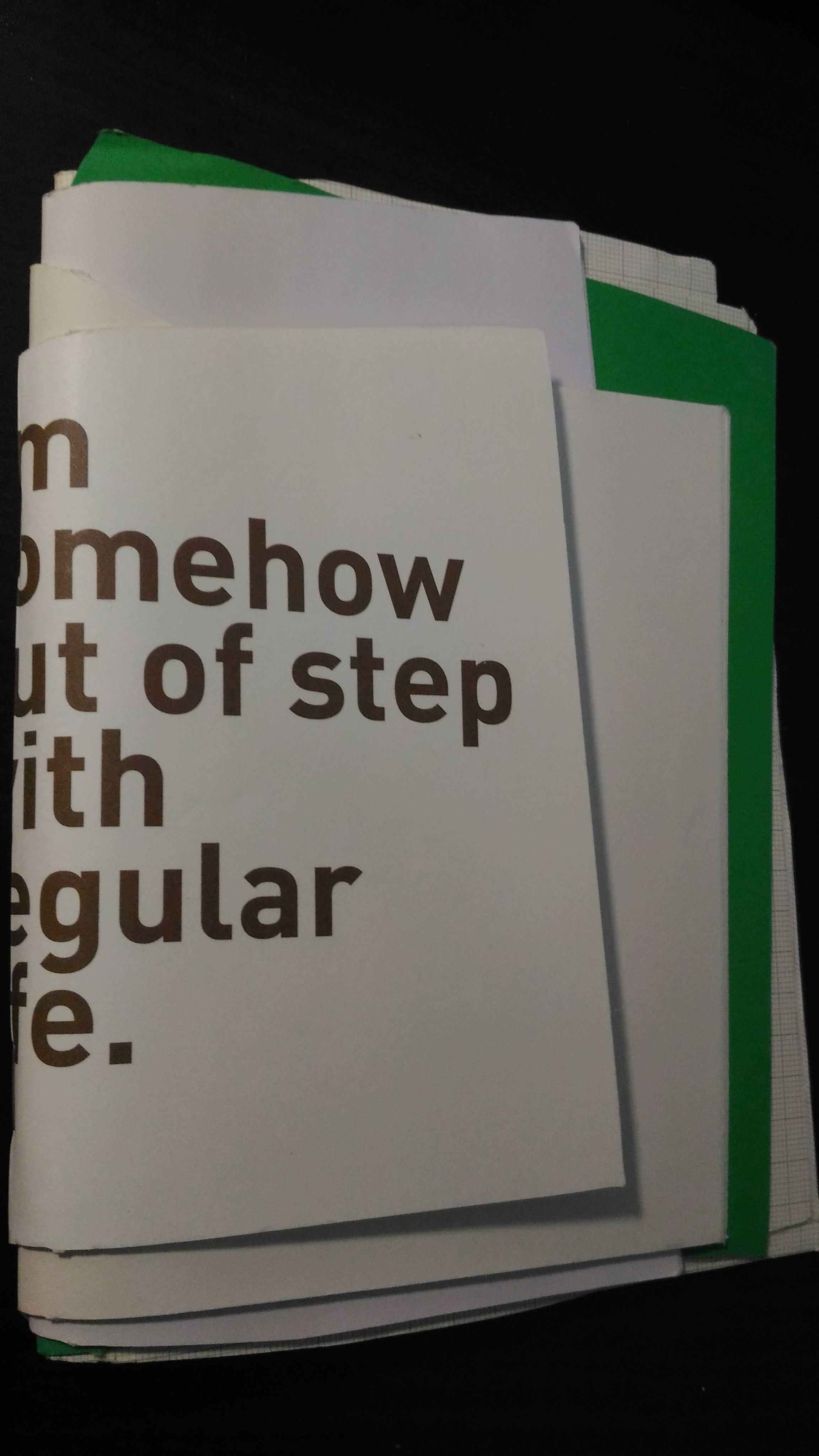 聶永真設計之設計無規則創意筆記本